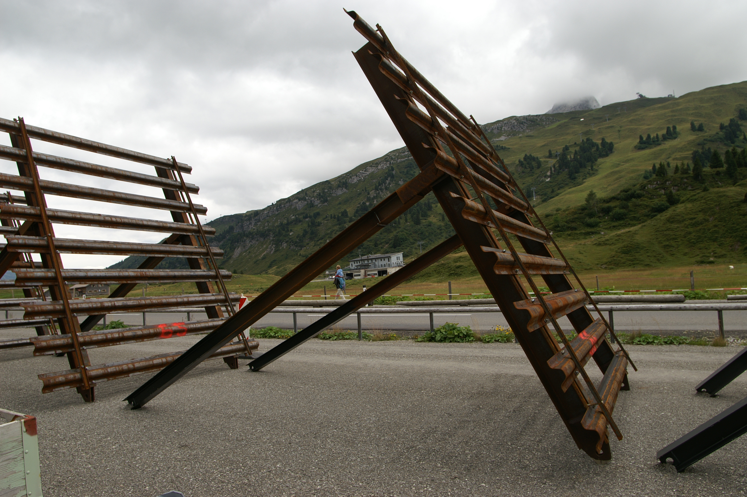 Stahlschneebrücke (Lawinenfangzaun) Vormontageplatz am Hochtannbergpass im Bregenzerwald , Vorarlberg